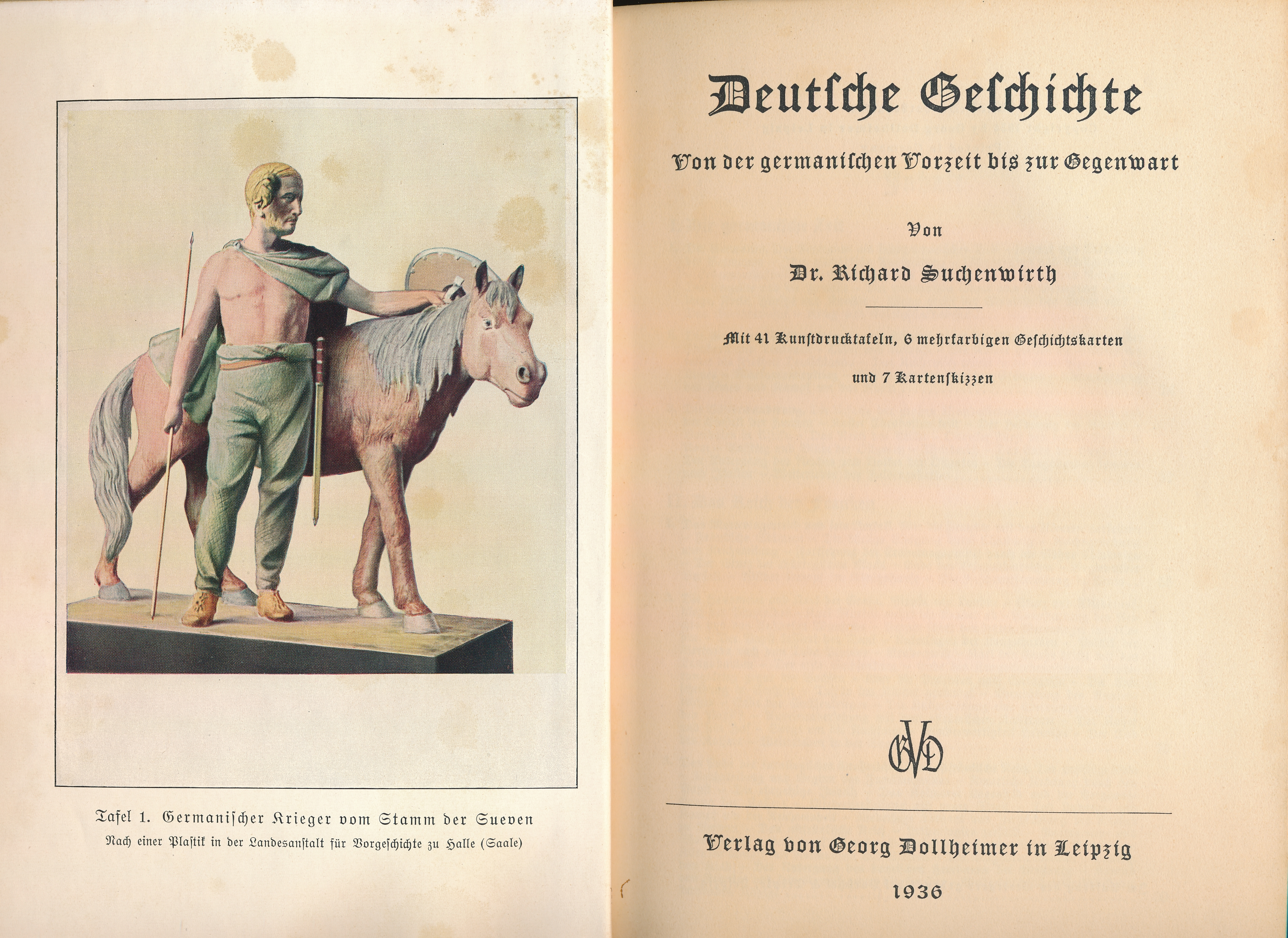 Richard Suchenwirth: Deutsche Geschichte, Ausgabe 1936